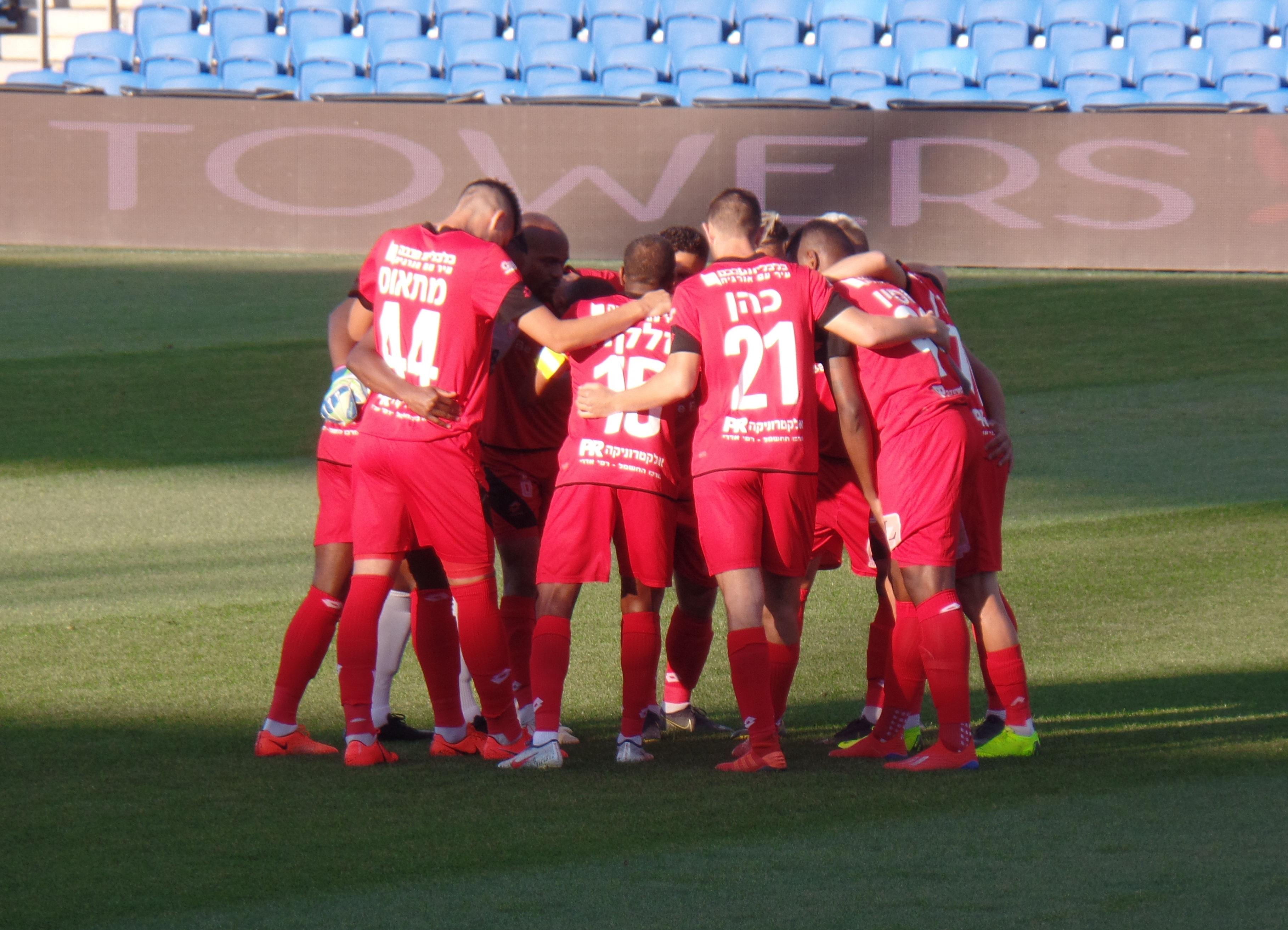 הפועל חדרה